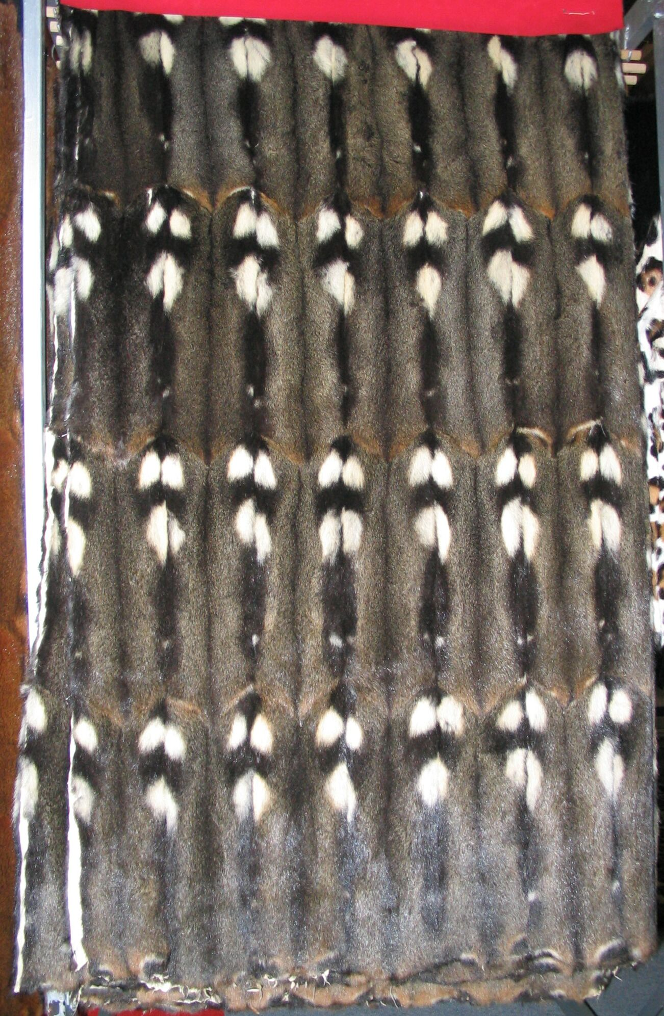 Hamster lining; Hamsterfutter (Pelz-Halbfertigprodukt). Traditionelle handelsübliche Handelsform für den europäischen Hamster überhaupt, ein Mal gefaltet. Seltenere schwärzliche Variante, Ungarn. Abgebildet ein 4-Zeiler.